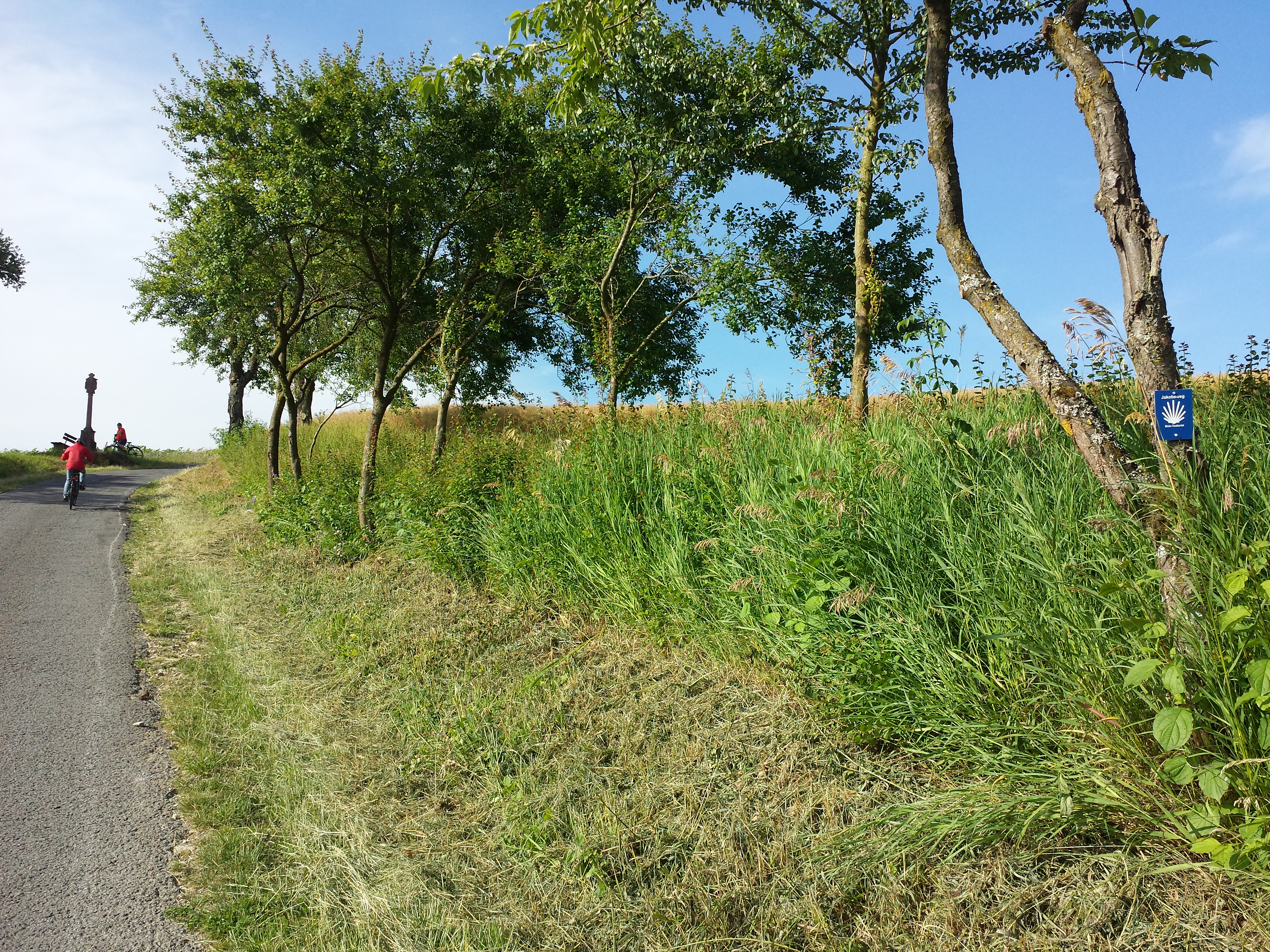 Der Jakobsweg Main-Taubertal zwischen Dienstadt und Königheim im Main-Tauber-Kreis in Baden-Württemberg.